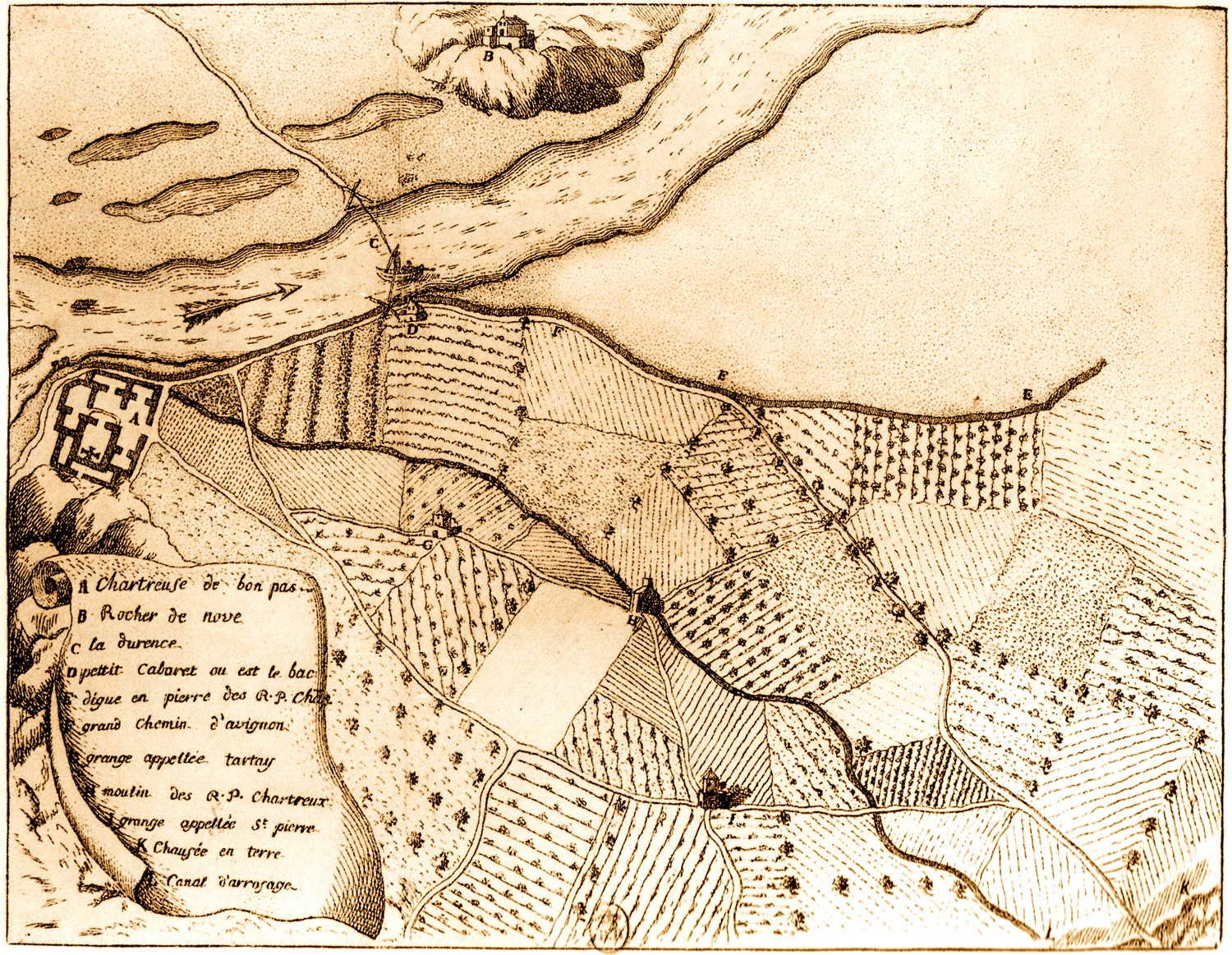 Le bac de Bonpas sur la Durance était affermé par les moines de la Chartreuse qui en possédaient les droits